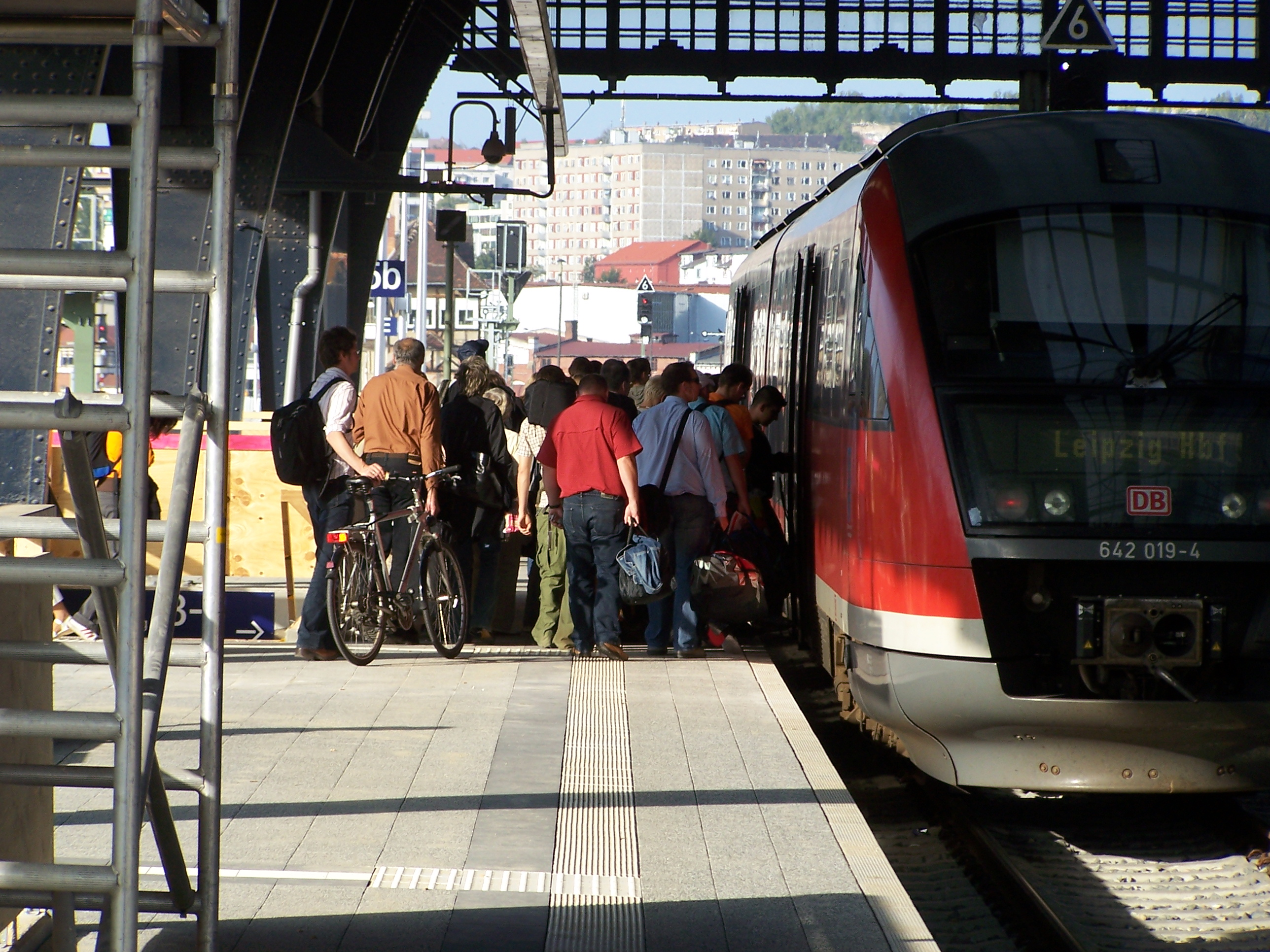 Bahnsteige in der Bahnhofshalle wieder in Betrieb.